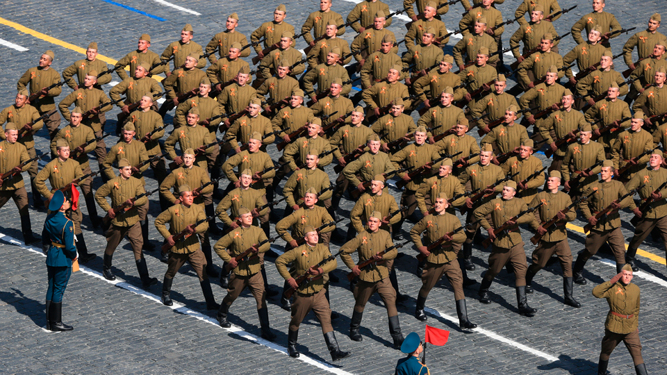 Парад в честь 70-летия Великой Победы